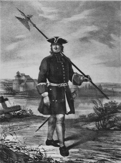 Сержант Пехотного полка с 1700 по 1720 год. Вид изображает Крепость Мариенбург в Лифляндии, покоренную Российскими войсками в 1702 году.